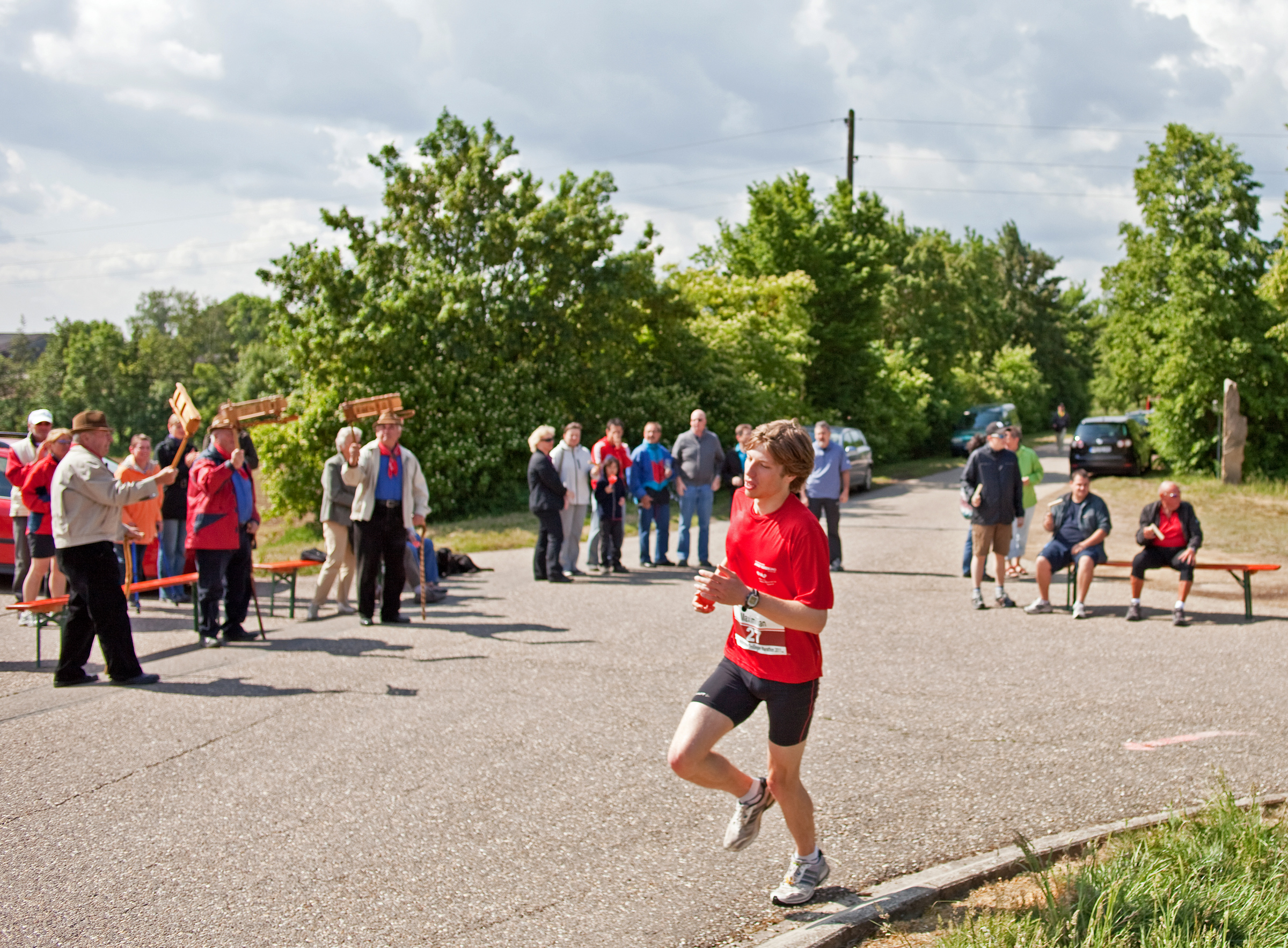 Die Mönchsberg-Rätscher in Aktion.... Sie rätschen in einem ganz bestimmten Rhythmus, und dafür müssen sie natürlich auch proben. Aber weil sie das unmöglich in einem geschlossenen Raum tun können (sonst würde ihnen das Trommelfell platzen), tun sie das im Steinbruch im Wald. Nach getaner Probe gehen sie dann zur Waldschenke Hörnle und essen einen Rostbraten....